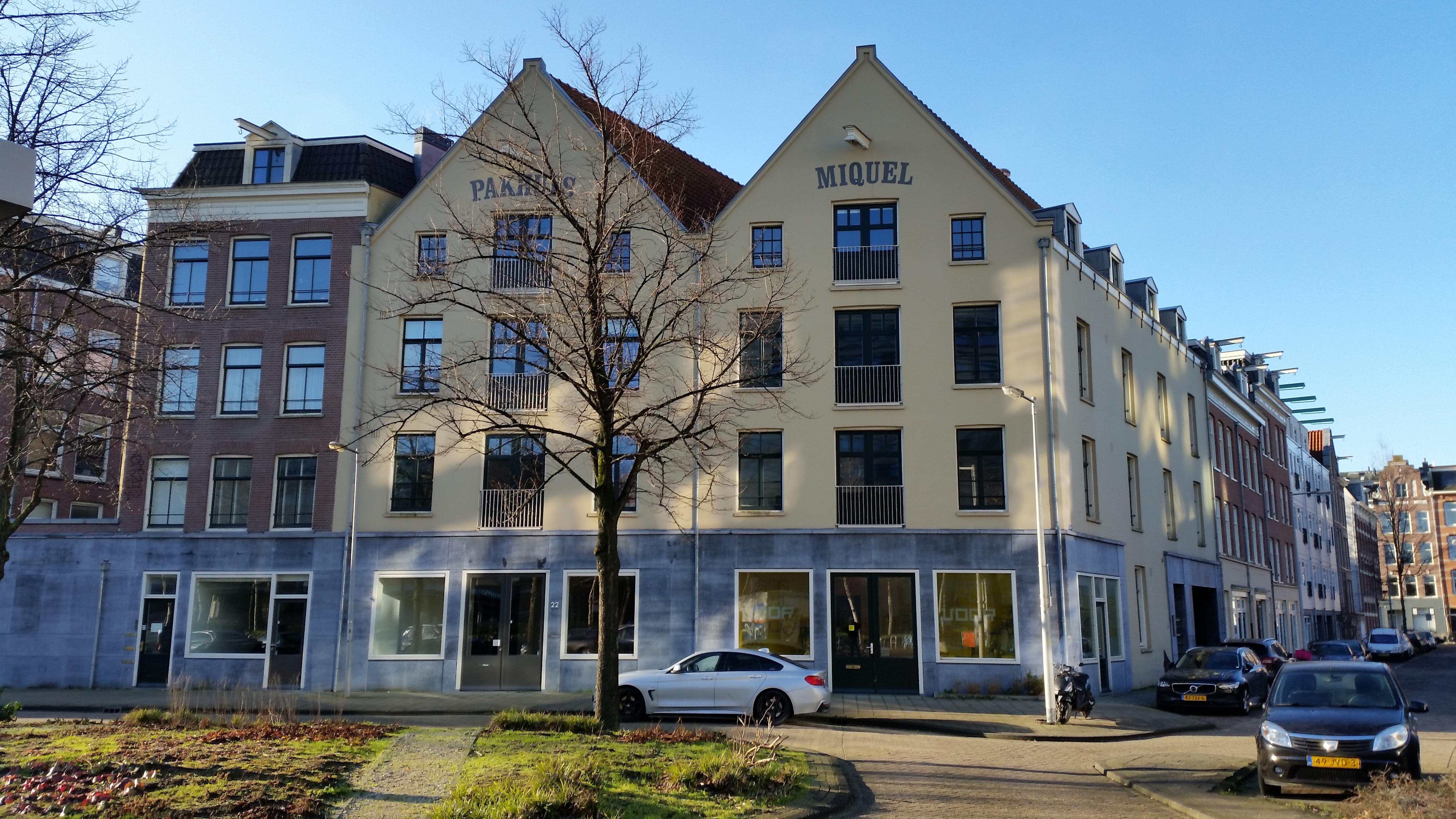 Pakhuys Miquel op Wibautstraat 20-22 (vrnl), voorheen pakhuizen aan Miquelstraat 2-4, Amsterdam